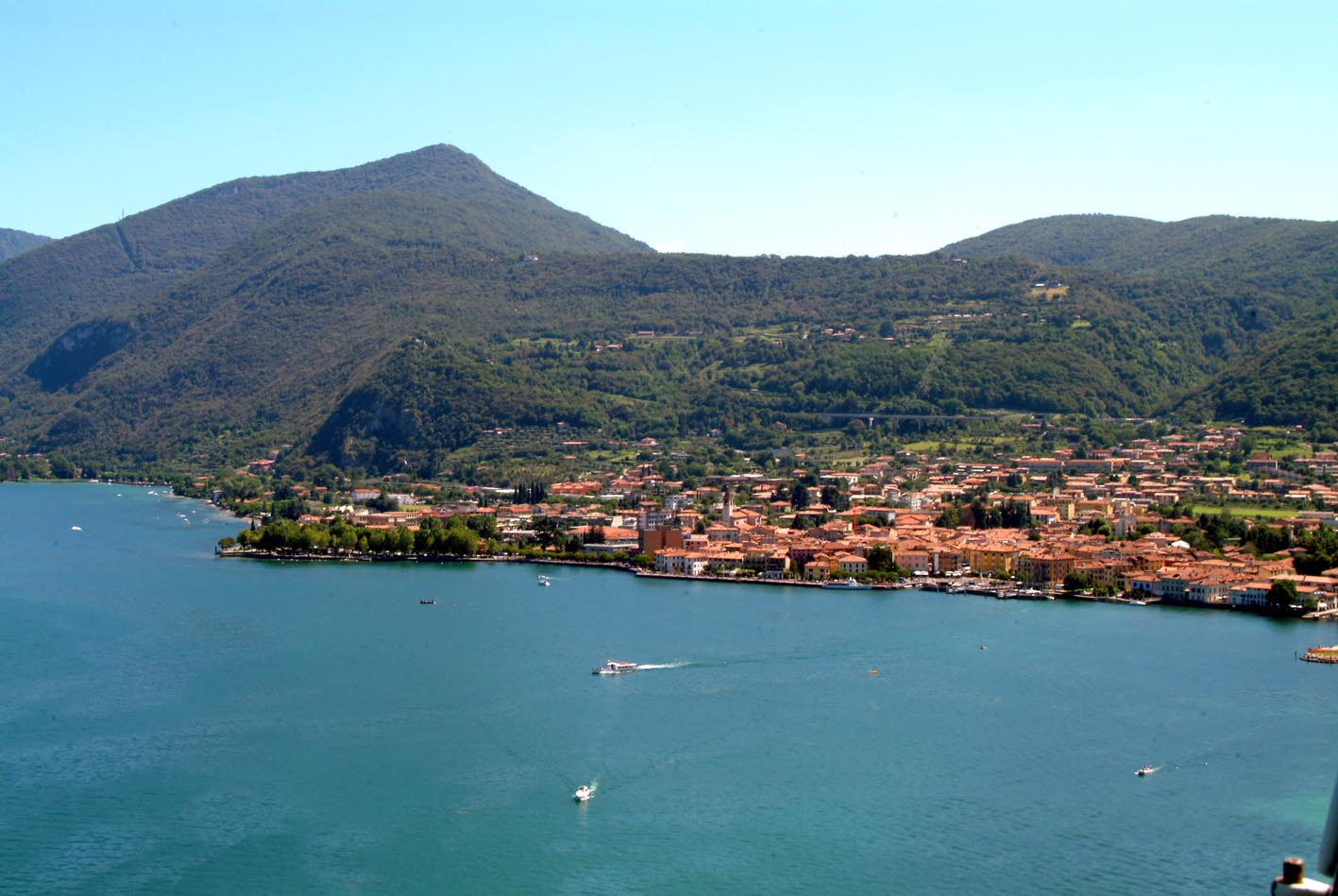 Iseo, provincia di Brescia, panorama (Foto Sbardolini)